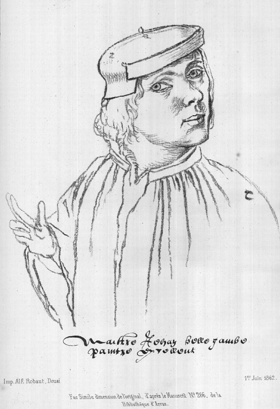 Jehan de Bellegambre de Douai par A. Preux, in Souvenirs de la Flandre-wallonne : recherches historiques et choix de documents relatifs à Douai et à la province / publiés par une réunion d'amateurs et d'archéologues 1862, imprimerie Wartelle (numérisé par Gallica).